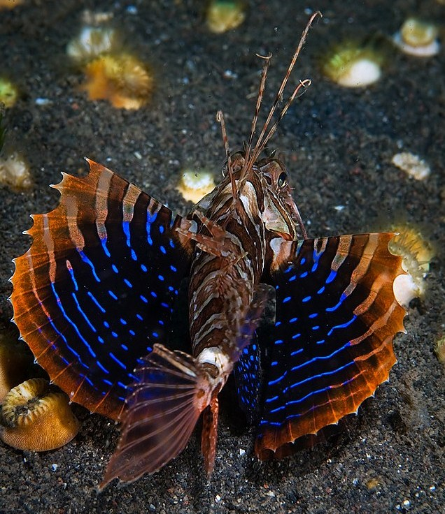 Parapterois heterura